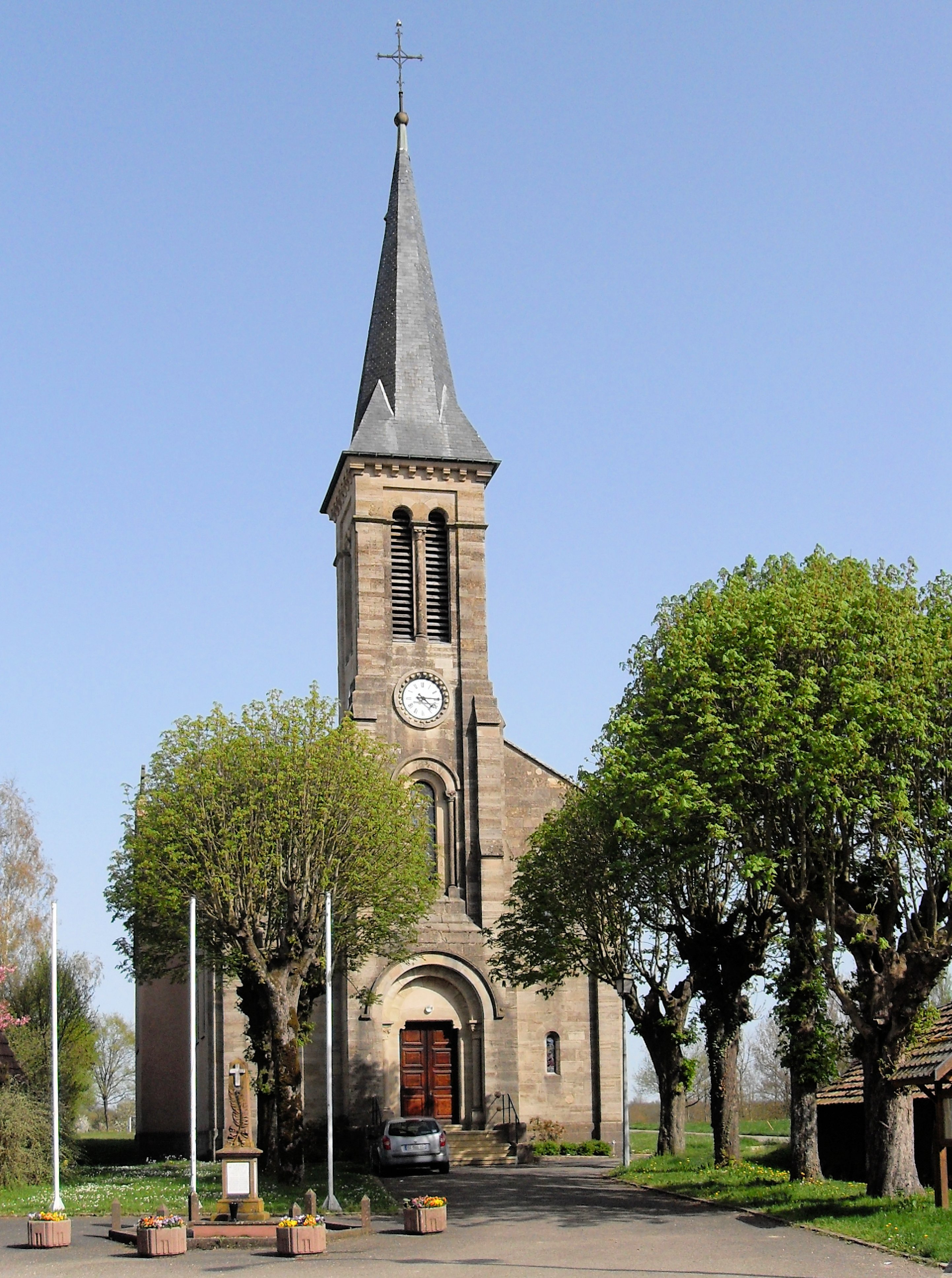 L'église Saint-Matthieu à Chavannes-sur-l'Étang